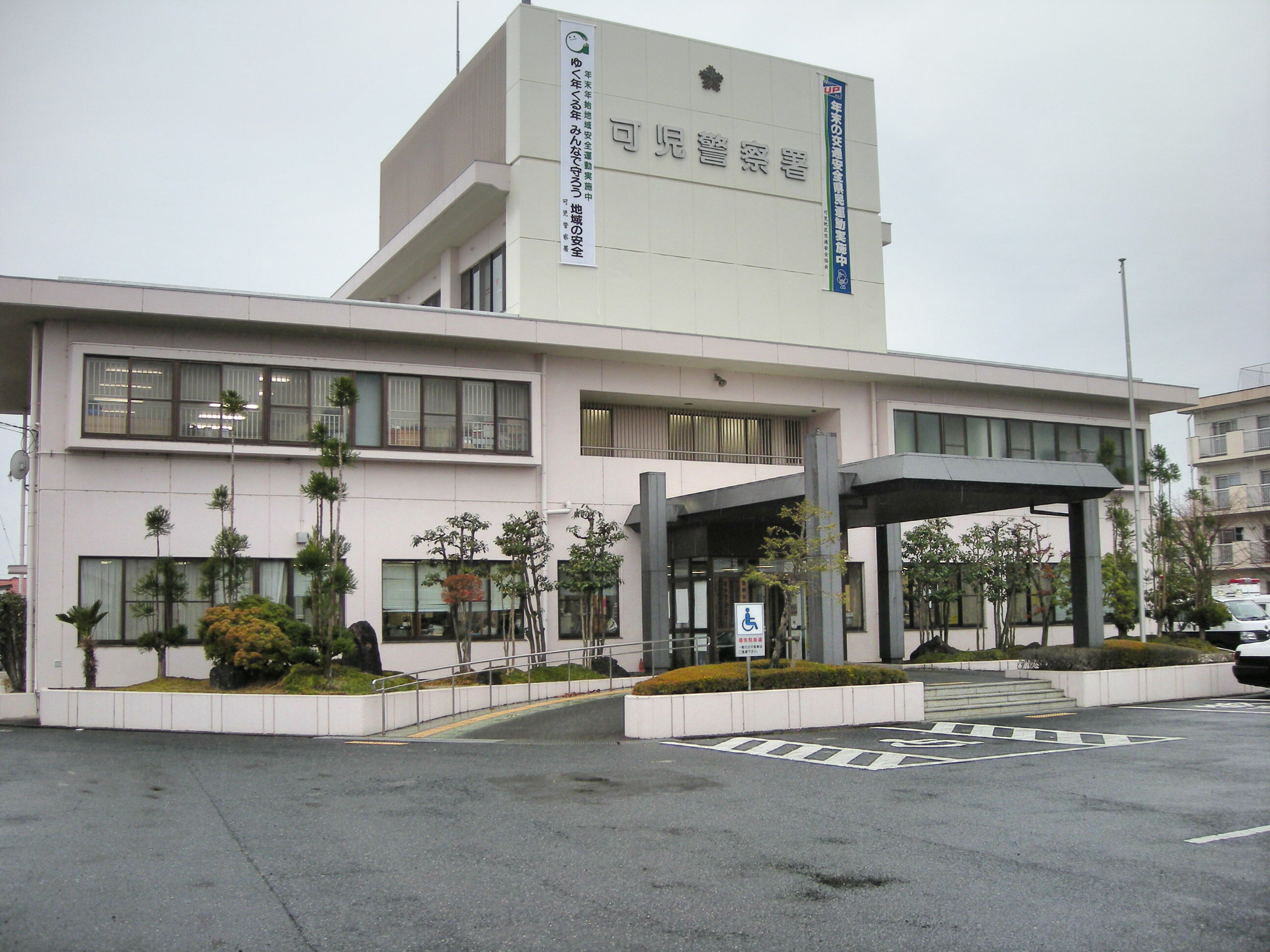 Kani Police Station（可児警察署）